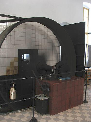 Hlavní řemenice v historické hydroelektrárně Písek.